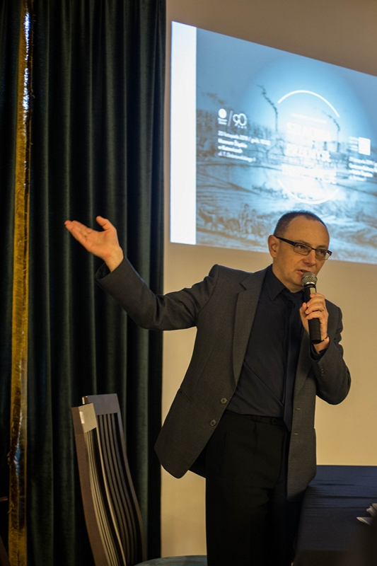 dr Arkadiusz Kuzio-Podrucki